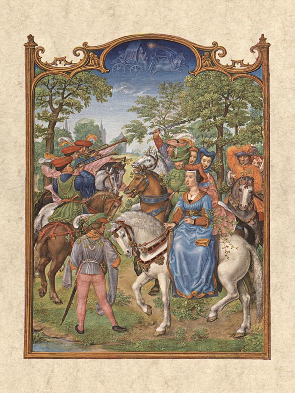 Mai, Brevarium Grimani, fol. 6v (Flemish)